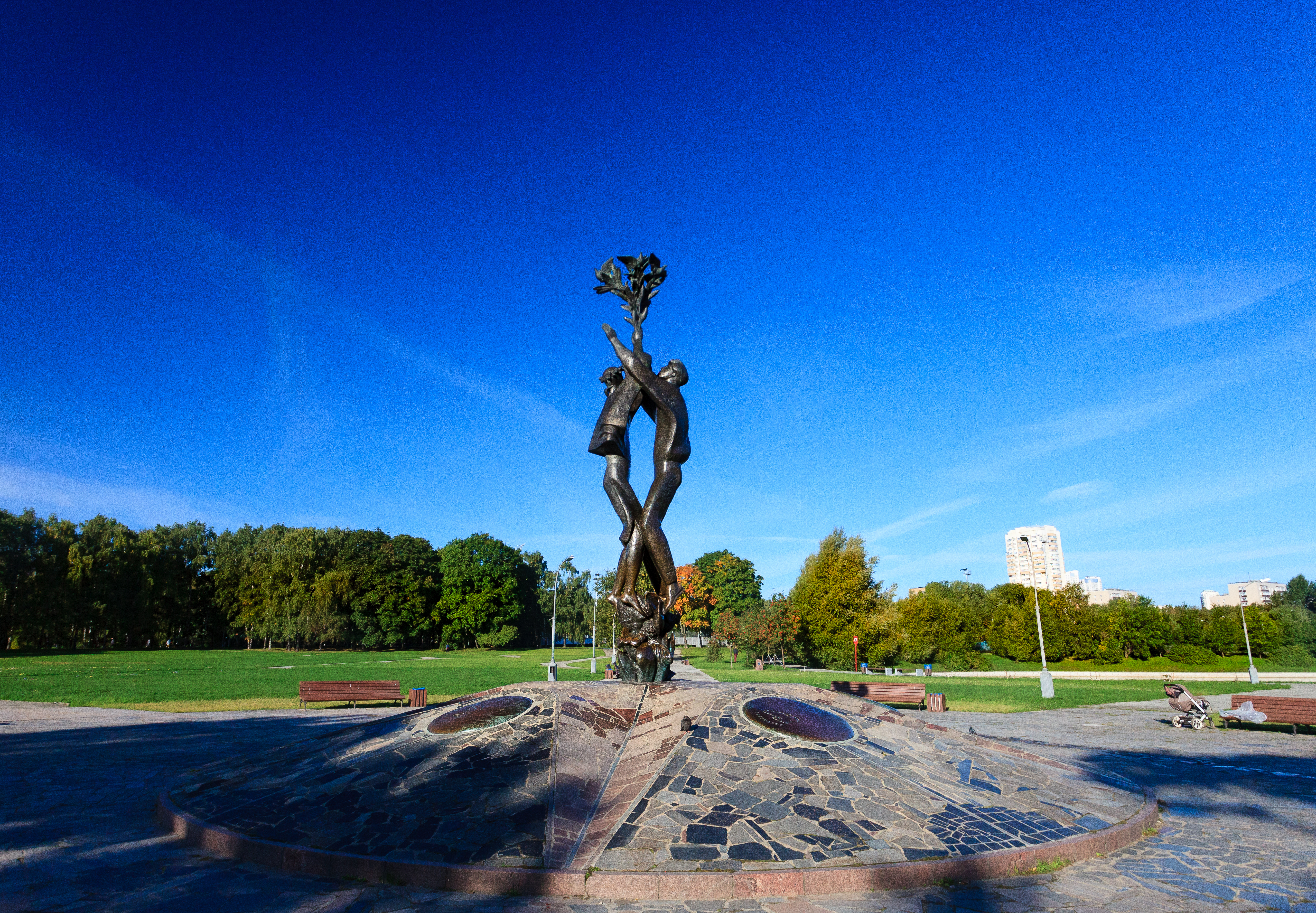 Скульптура "Дружба континентов" в парке Дружбы, САО Москвы, у станции метро "Речной вокзал". В основании пять бронзовых медальонов, каждый подписан в честь определённого континента: Европа, Азия, Австралия, Северная и Южная Америка. Парк Дружбы был основан в честь VI Всемирного фестиваля молодёжи и студентов 1957 года. Архитекторы - Галина Ежова, Анатолий Савин, Валентин Иванов, руководитель проекта - Виталий Долганов.